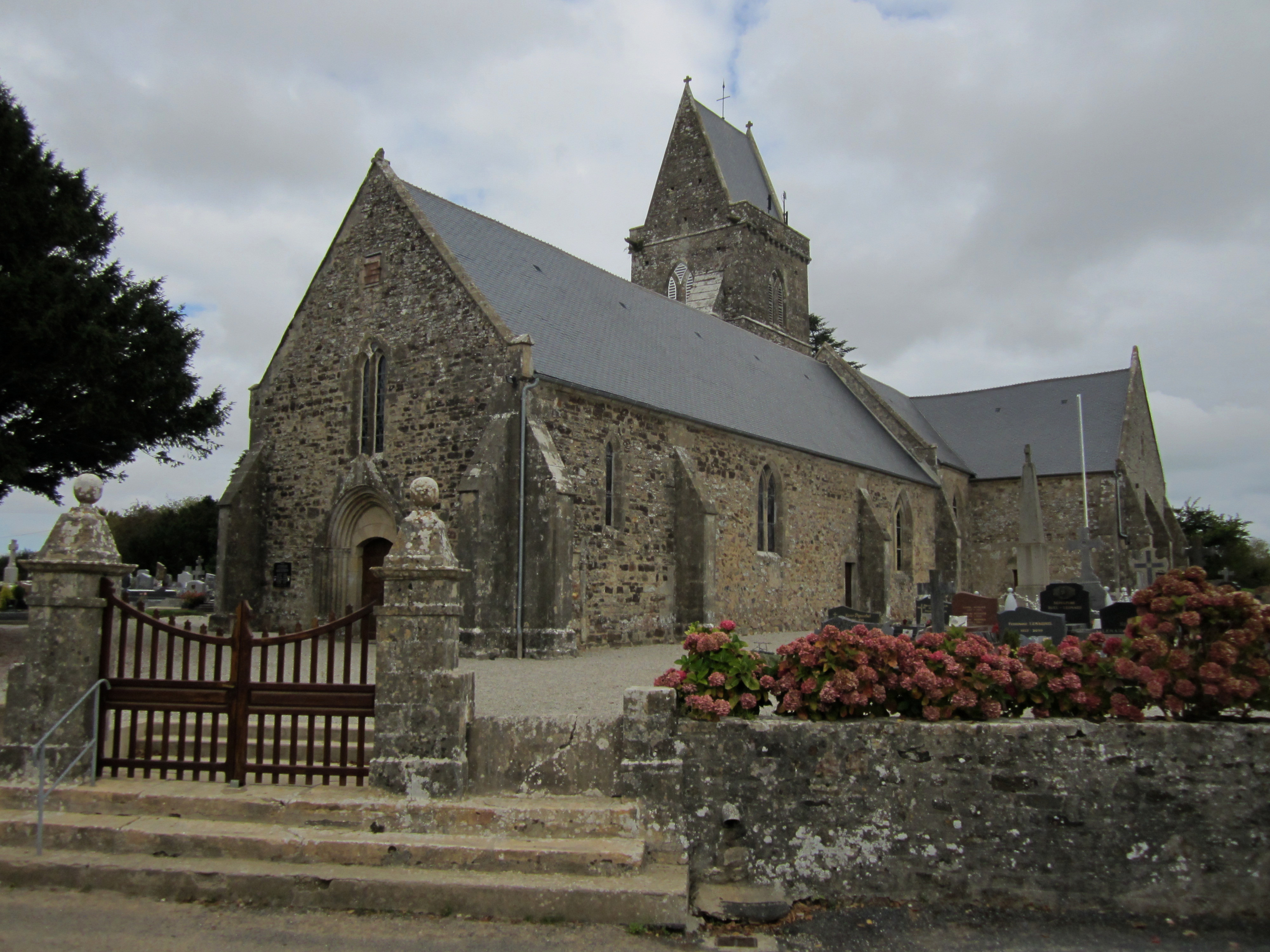 Octeville-l'Avenel, Manche